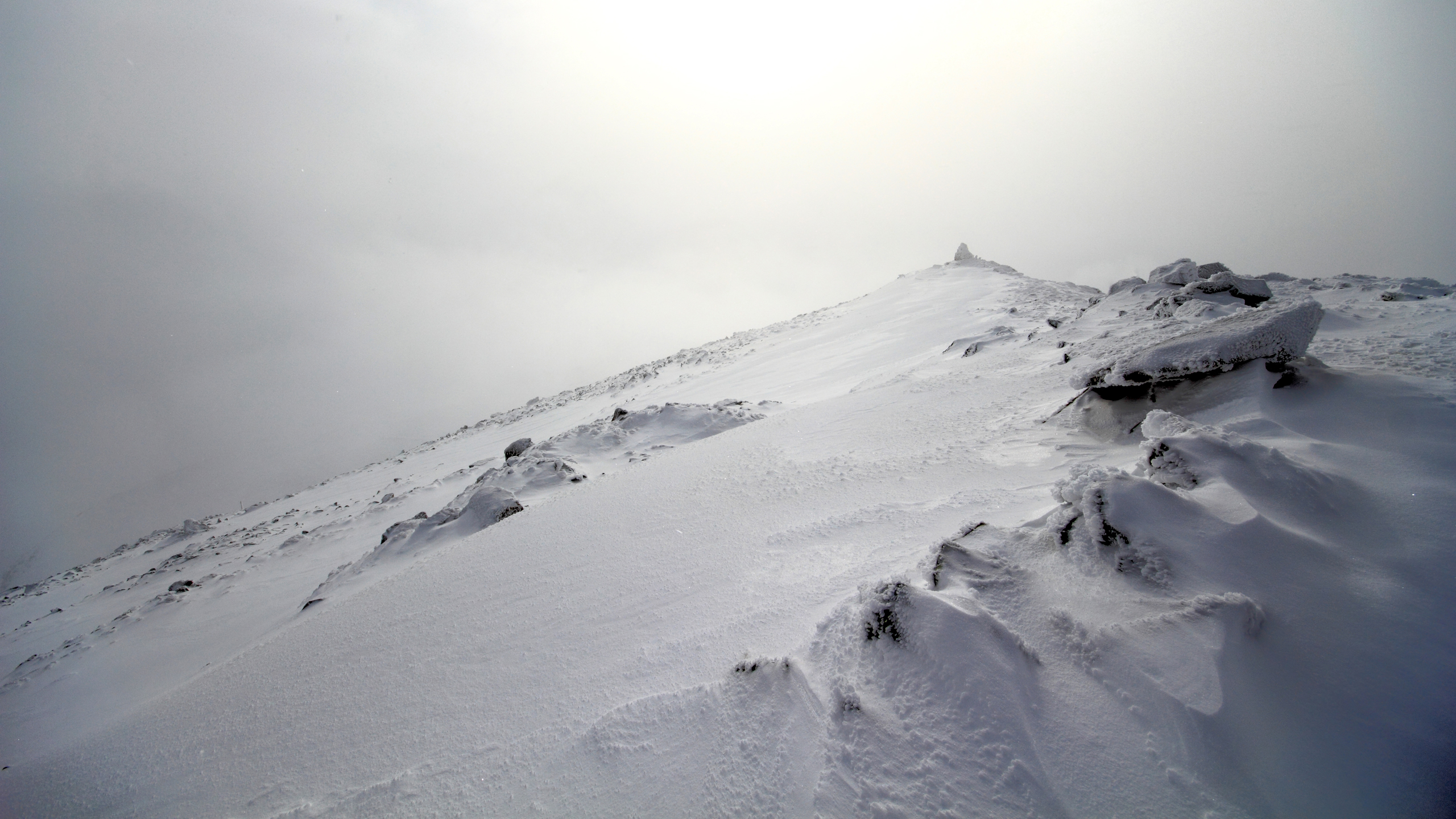 Zimski greben na Pelister